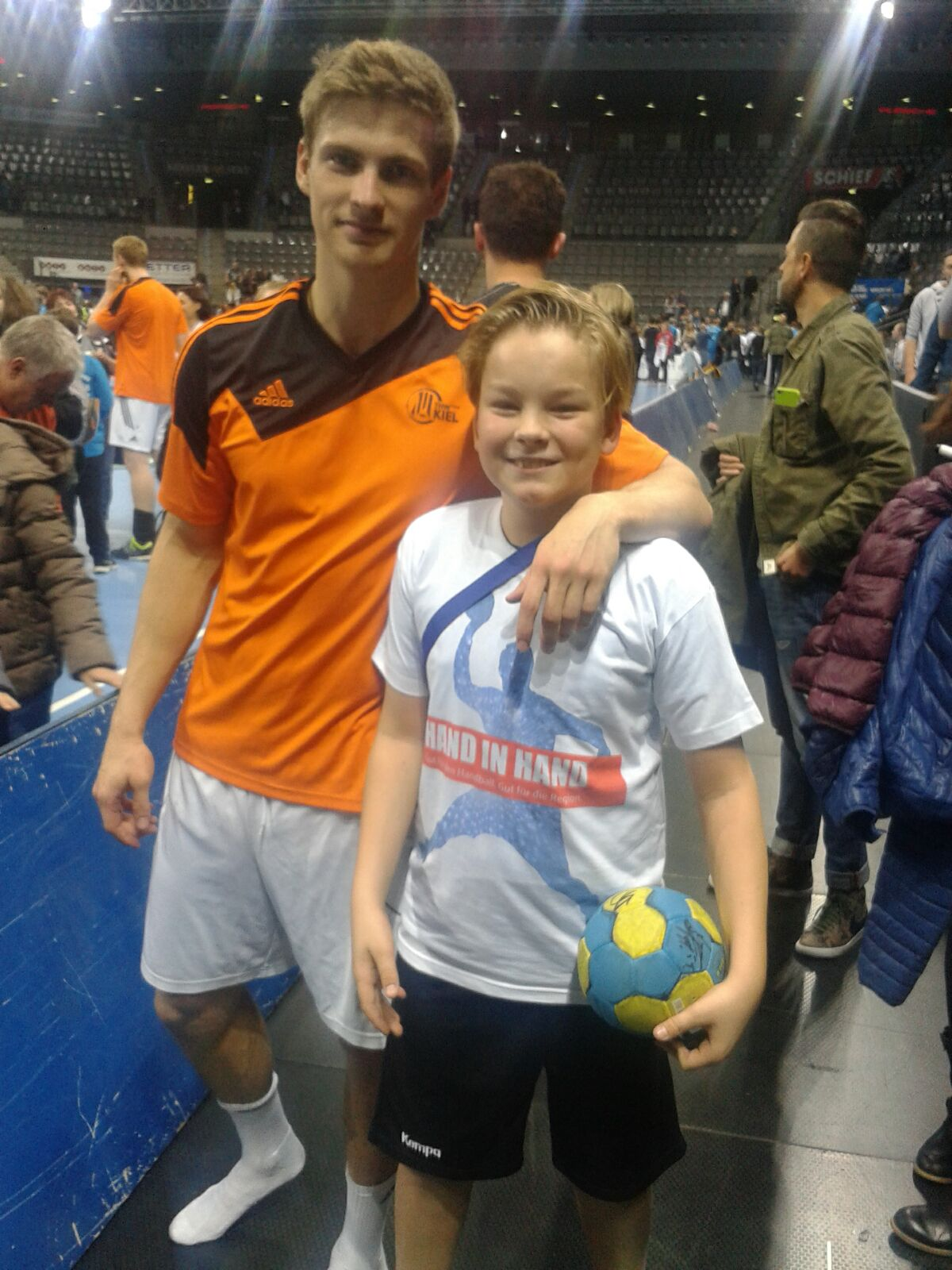 Rune Dahmke am 01.12.2015 Nach 35:26 Sieg in Stuttgart